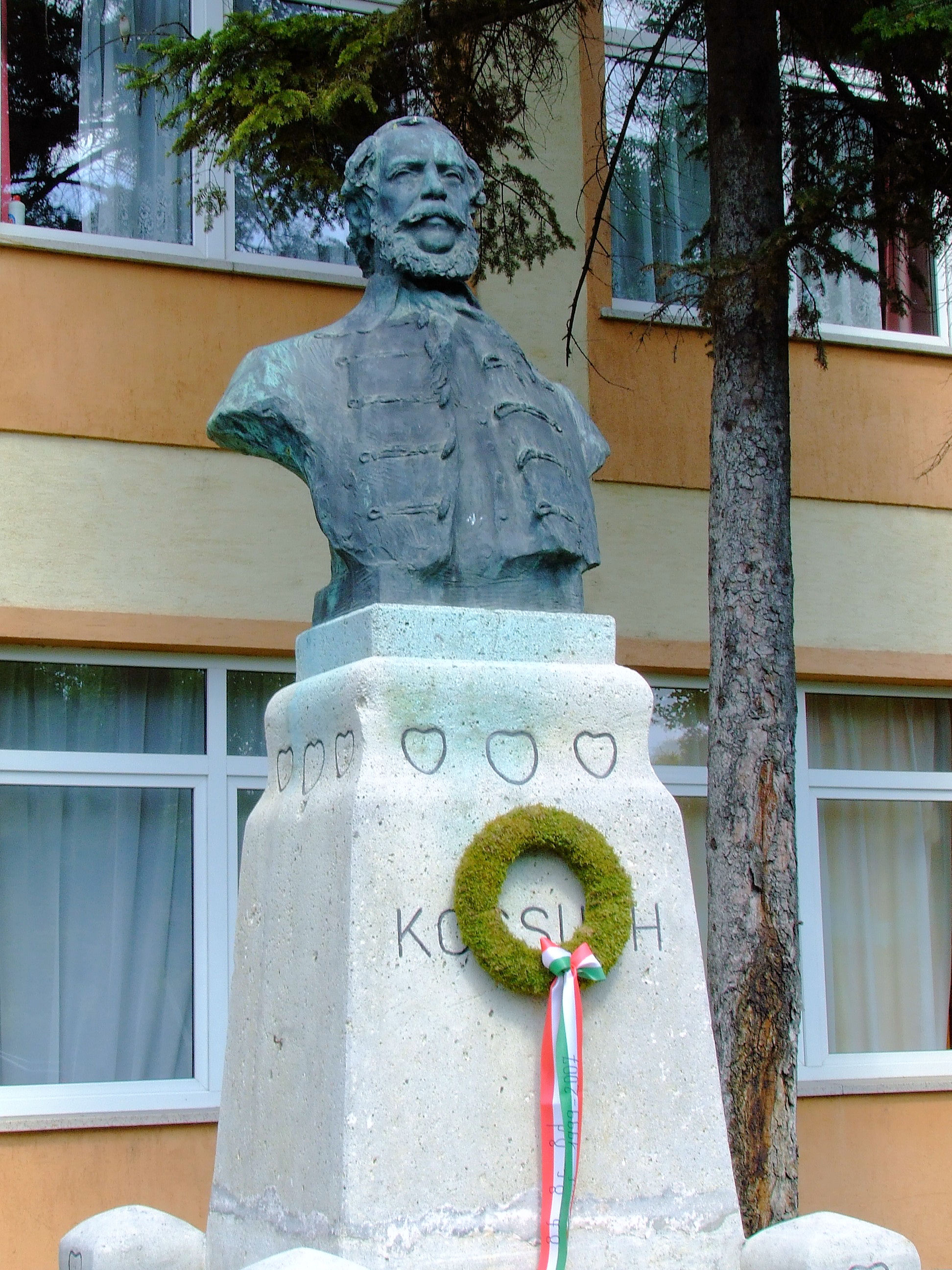 Kossuth Lajos szobra Soltvadkerten. Készült 1903-ban, soltvadkerti polgárok adományaiból. A szoboravatáson megjelent Kossuth Ferenc is. Horvay János alkotása